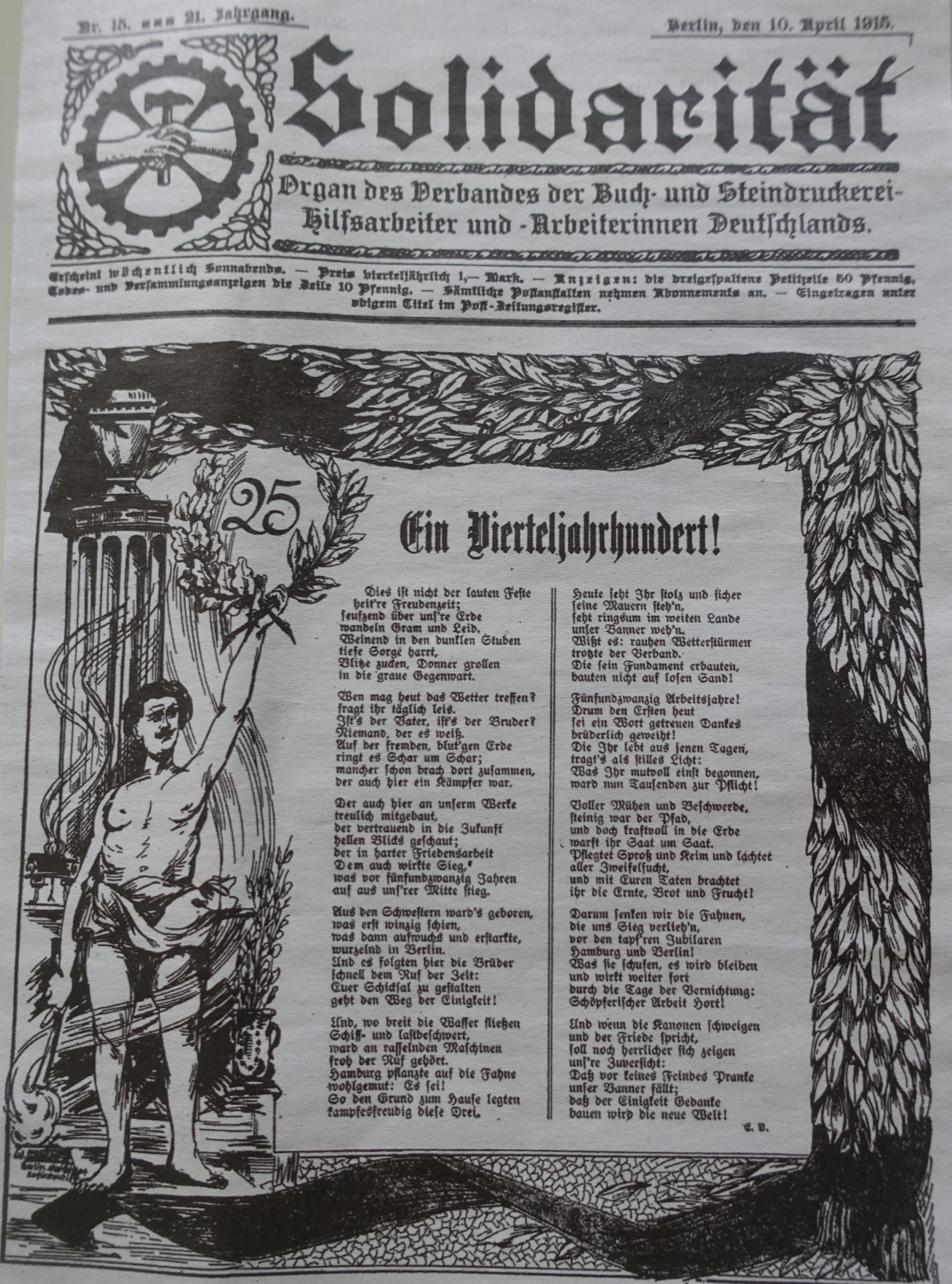 Jubiläumsausgabe der Verbandszeitschrift "Solidarität" vom 10.4.1915 des Verbandes der Buch- und Steindruckrei-Hilfsarbeiter und -Arbeiterinnen Deutschlands.